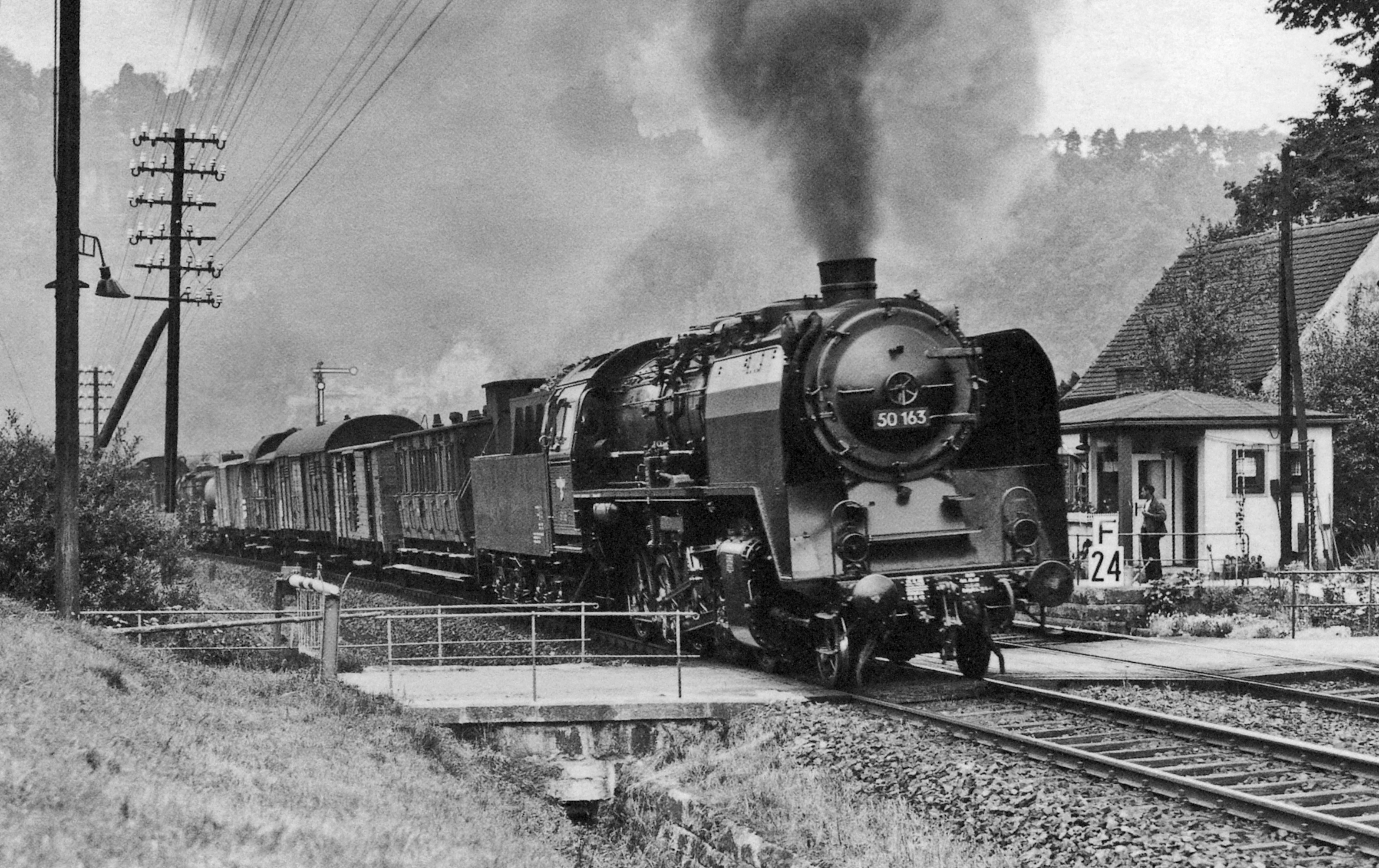 DRB 50.163 mit Güterzug bei Rathen im Elbtal